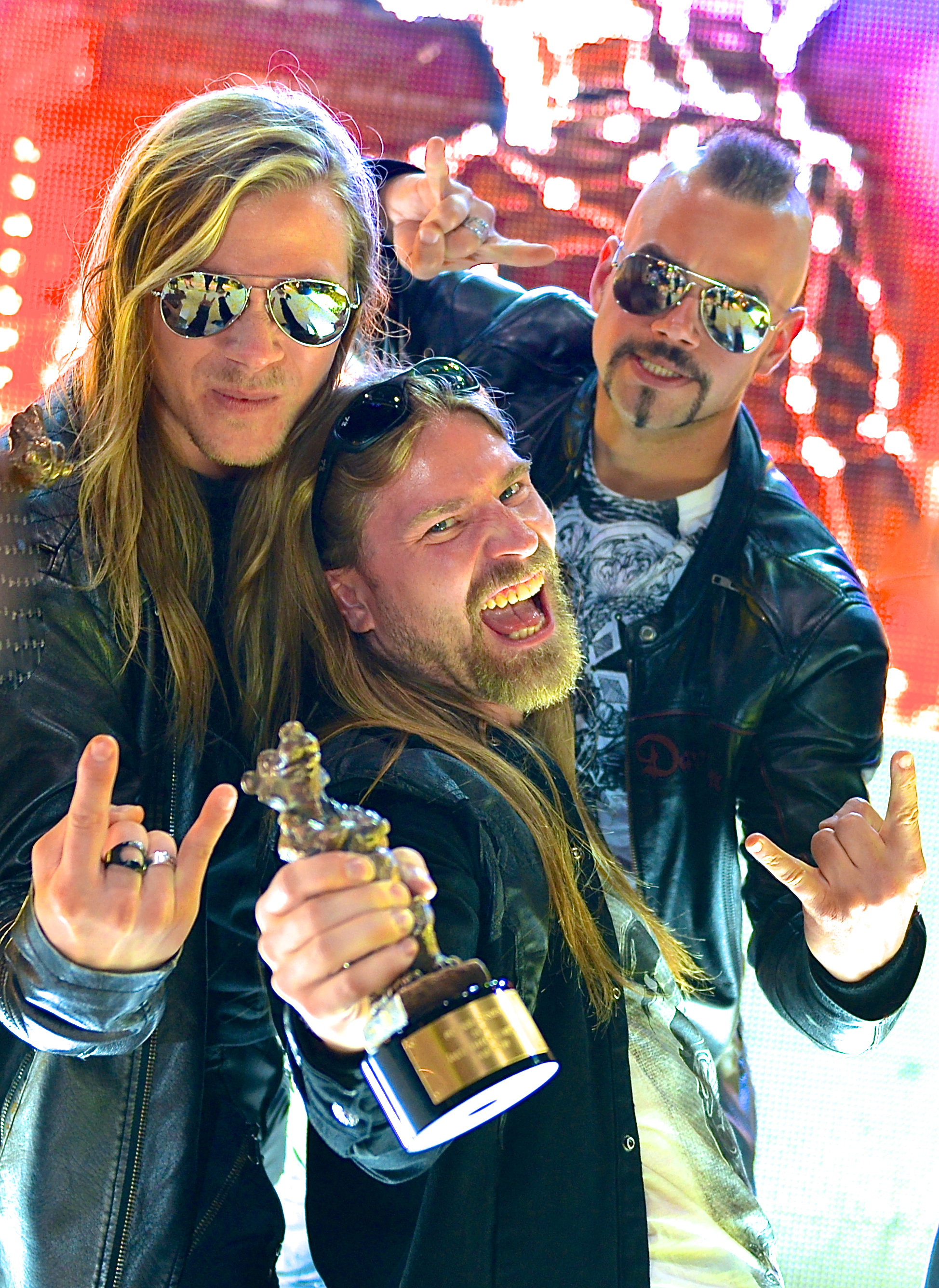 Rockbjörn-vinnarna Sabaton den 28 augusti 2013 på Gröna Lund i Stockholm.